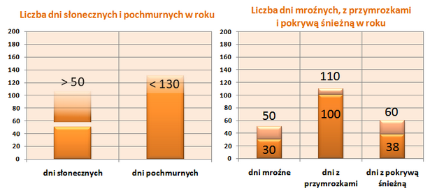 Grafika ilustrująca średnioroczny czas trwania dni słonecznych i pochmurnych dla Środy Wielkopolskiej